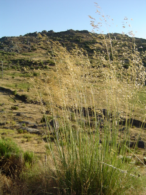 Stipa gigantea, Sierra de Ávila, España